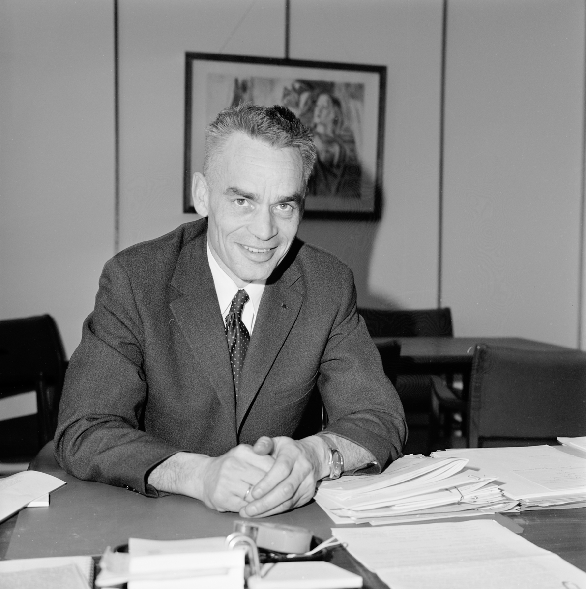 Statssekretær, senere helsedirektør, Torbjørn Mork, 1972